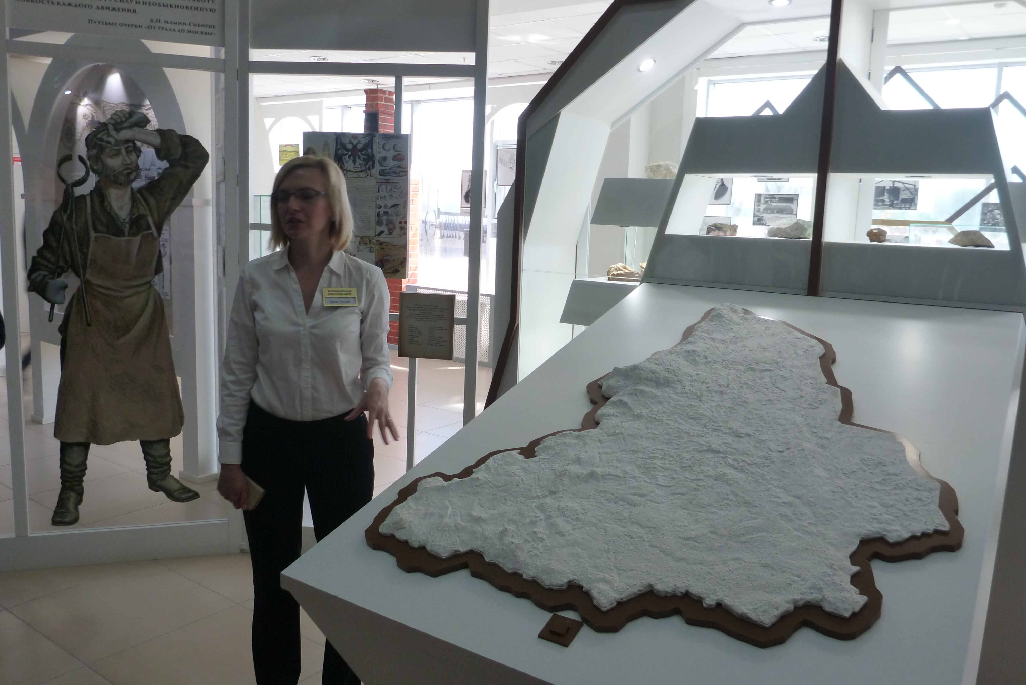 Экспозиция музея Горнозаводской цивилизации в Инновационном культурном центре в Первоуральске 7 июня 2019 года